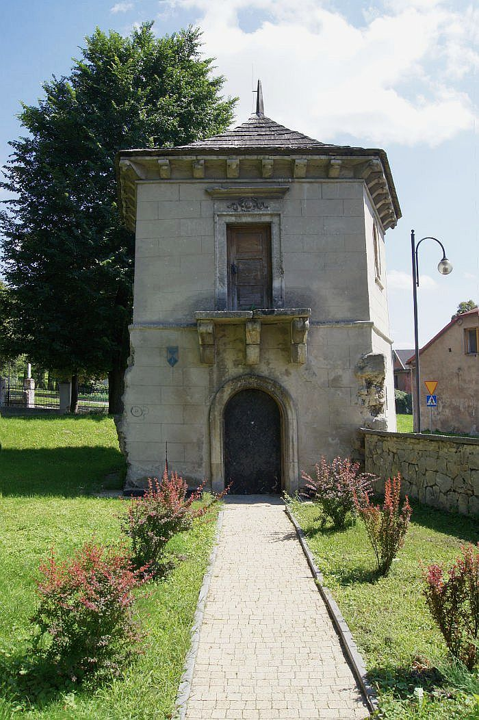 Pawilon ogrodowy w Pińczowie wzniesiony z fundacji Zygmunta Gonzagi Myszkowskiego pod koniec XVI wieku.